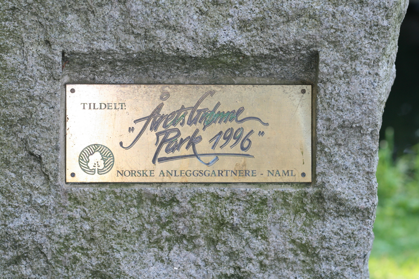 Sandvedparken_årets grønne park 1996